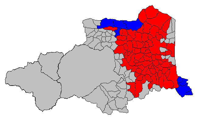 Denominacions d'origen dels vins dolços naturals del Rosselló:En blau al sud: AOC Banyuls i AOC Banyuls Grand CruEn blau al nord: AOC MauríEn vermell: AOC Ribesaltes Superposat: AOC Moscat de Ribesaltes i AOC Gran Rosselló